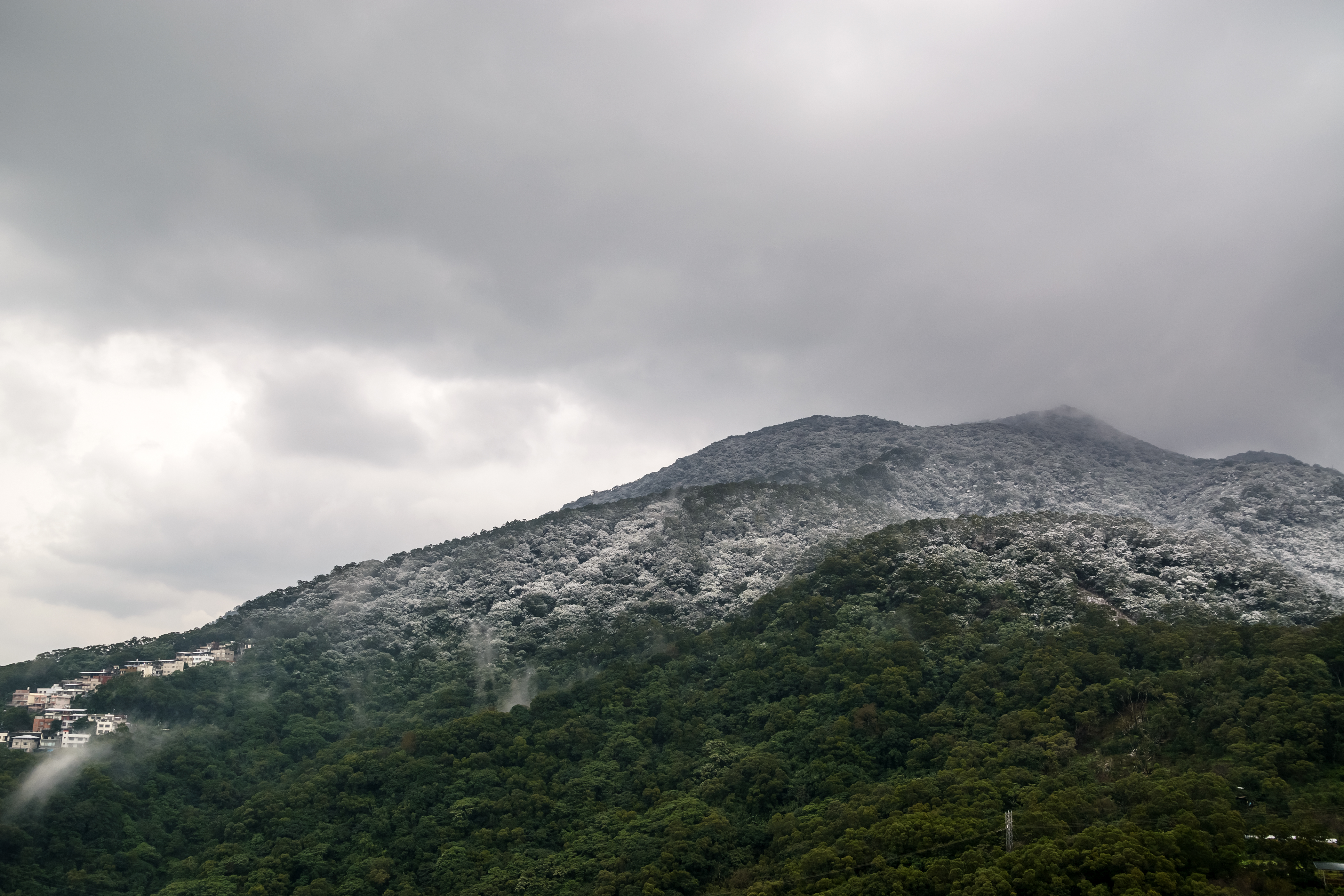 自大屯山山腳拍攝大屯山積雪情形